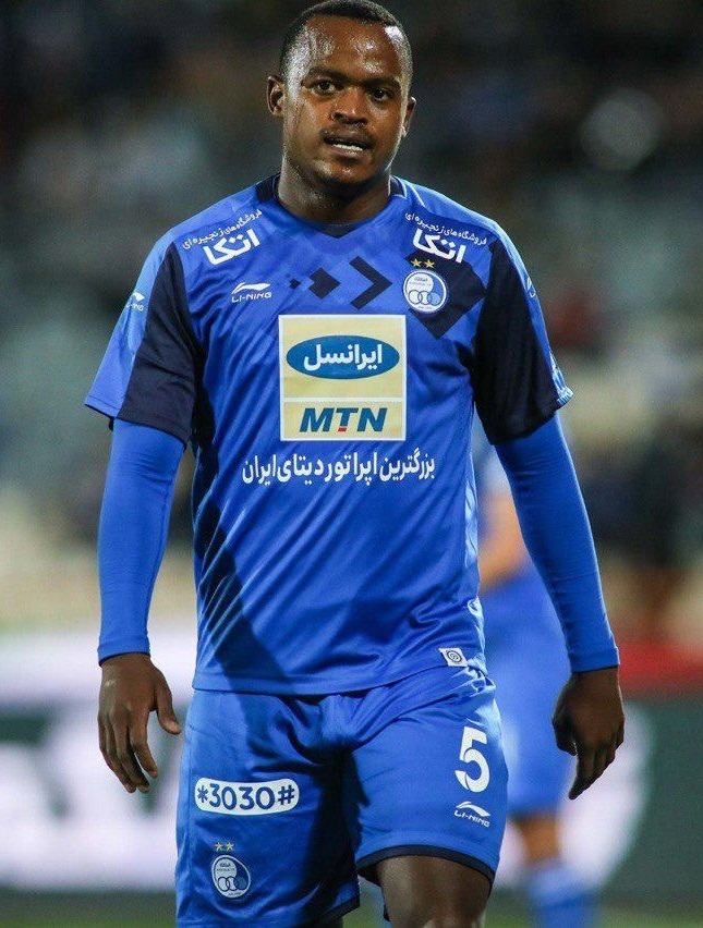 آیاندا پاتوسی